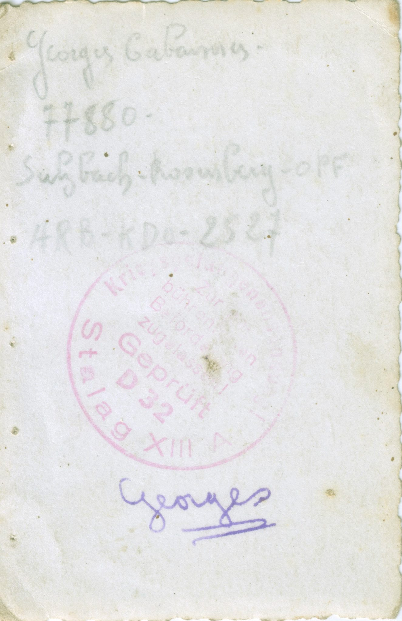 Carte du Stalag 13